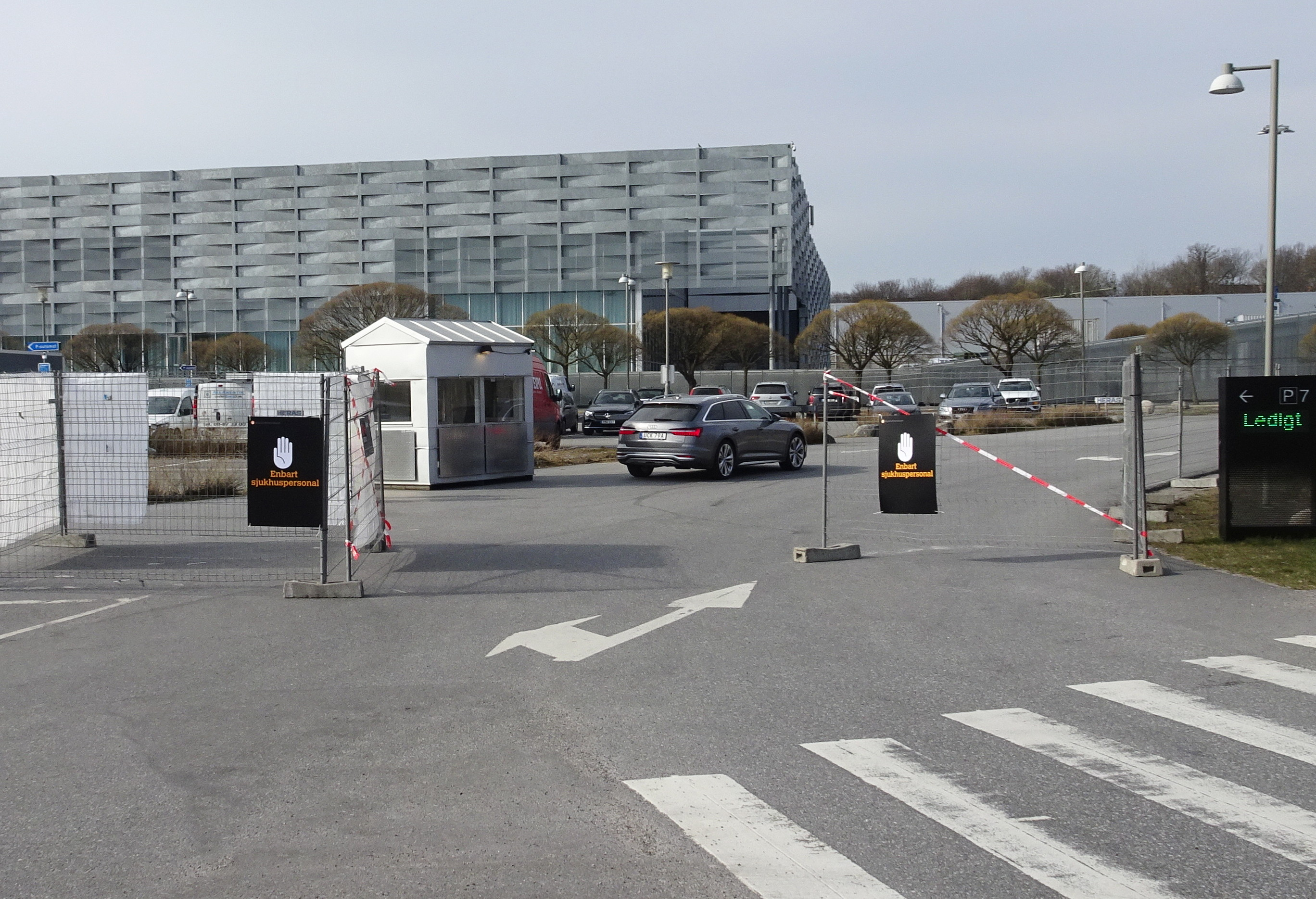 Provisoriskt sjukhus på Stockholmsmässan